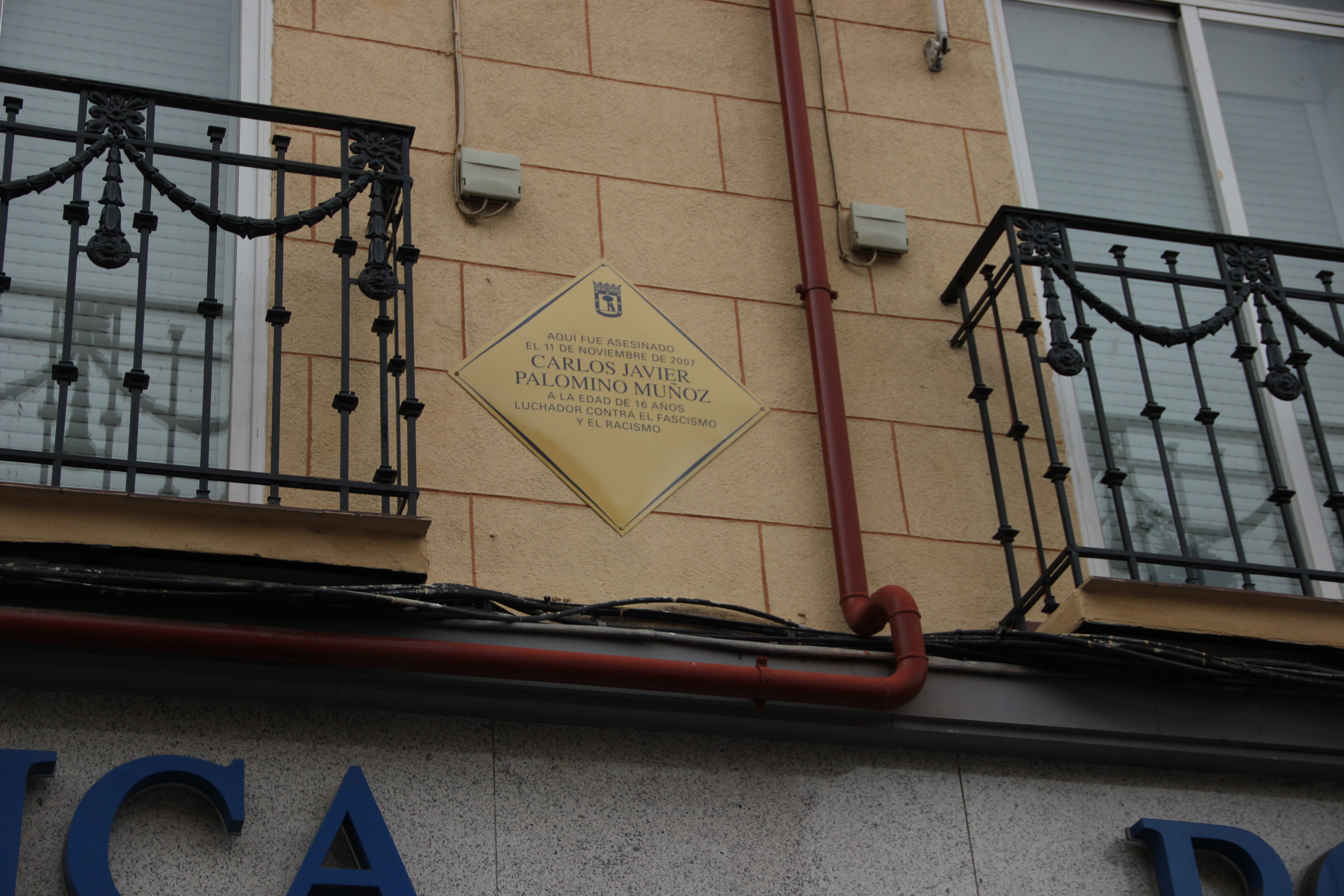 La placa a Carlos Palomino se ha colocado en el paseo de Delicias 145, donde murió asesinado Carlos Palomino el 11 de noviembre de 2007